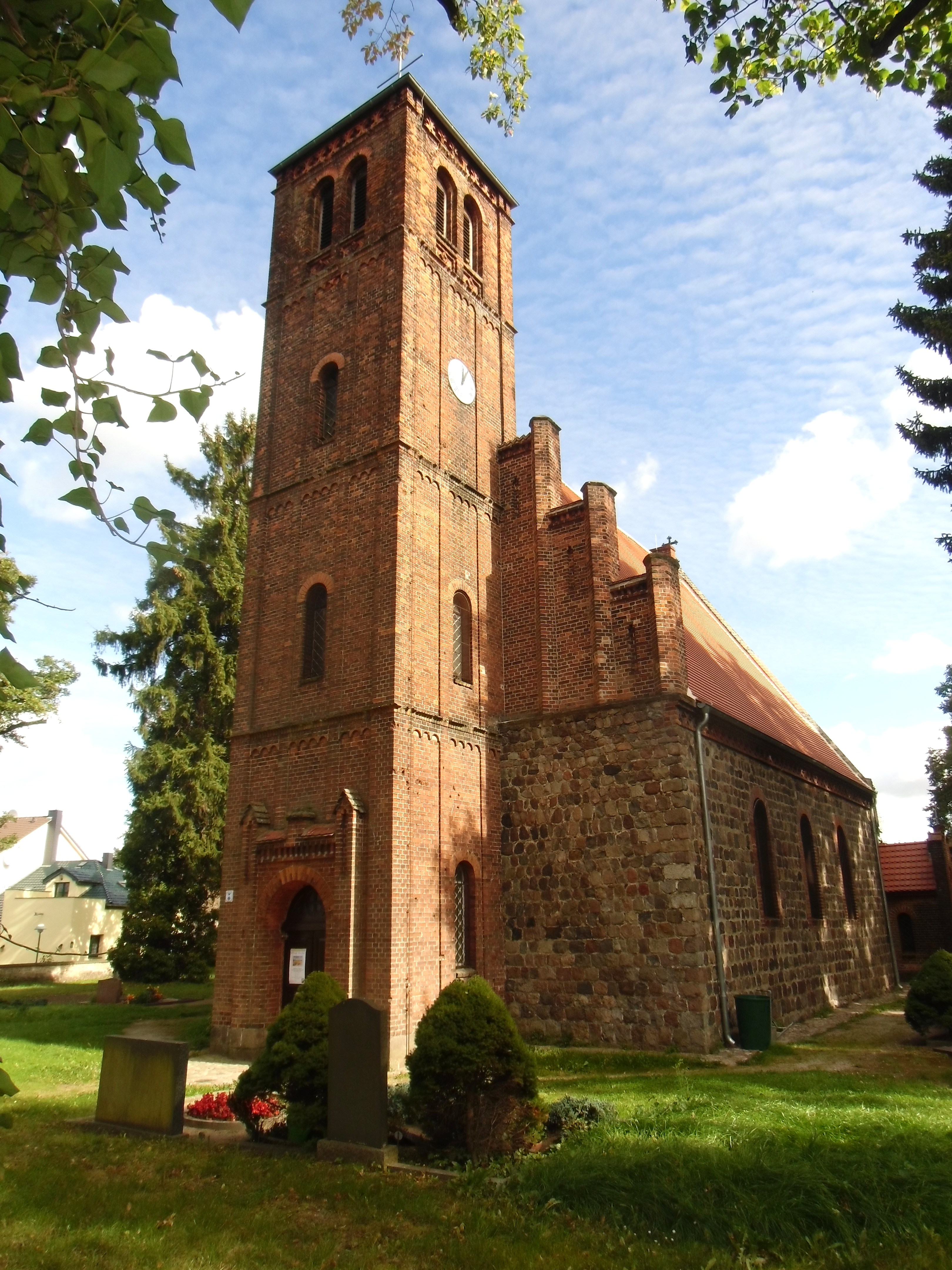 Denkmalgeschützte Feldsteinkirche in Ladeburg, Mitte des 13. Jahrhunderts errichtet. Nr. 68 der Liste der Baudenkmale in Bernau bei Berlin.